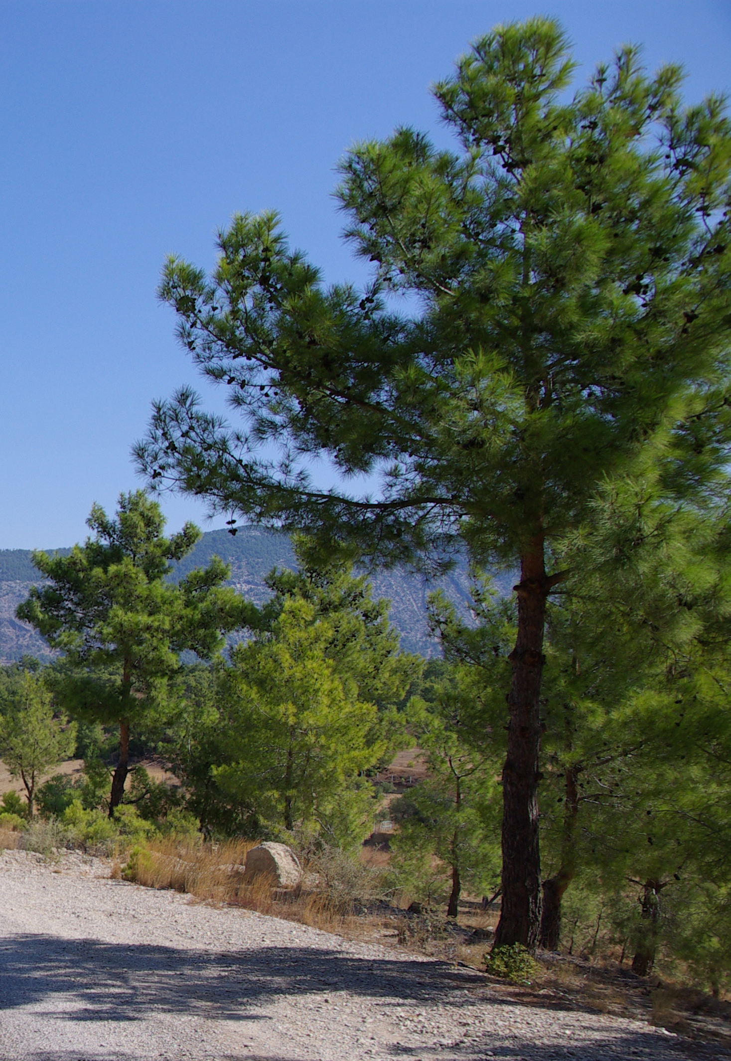 Pinus brutia, Taurus Mountains, Turkey